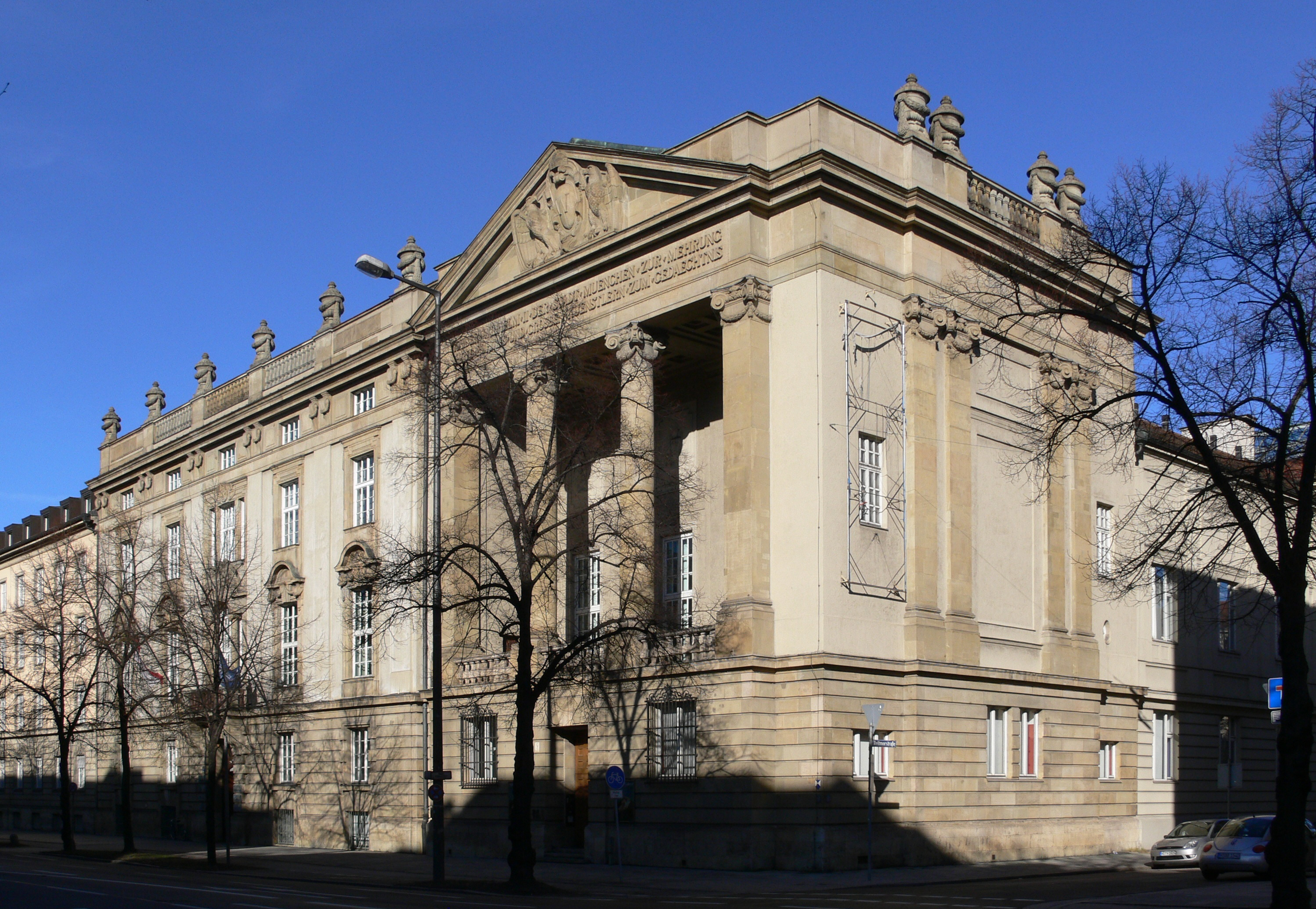 München, Prinzregentenstraße: Schack-Galerie